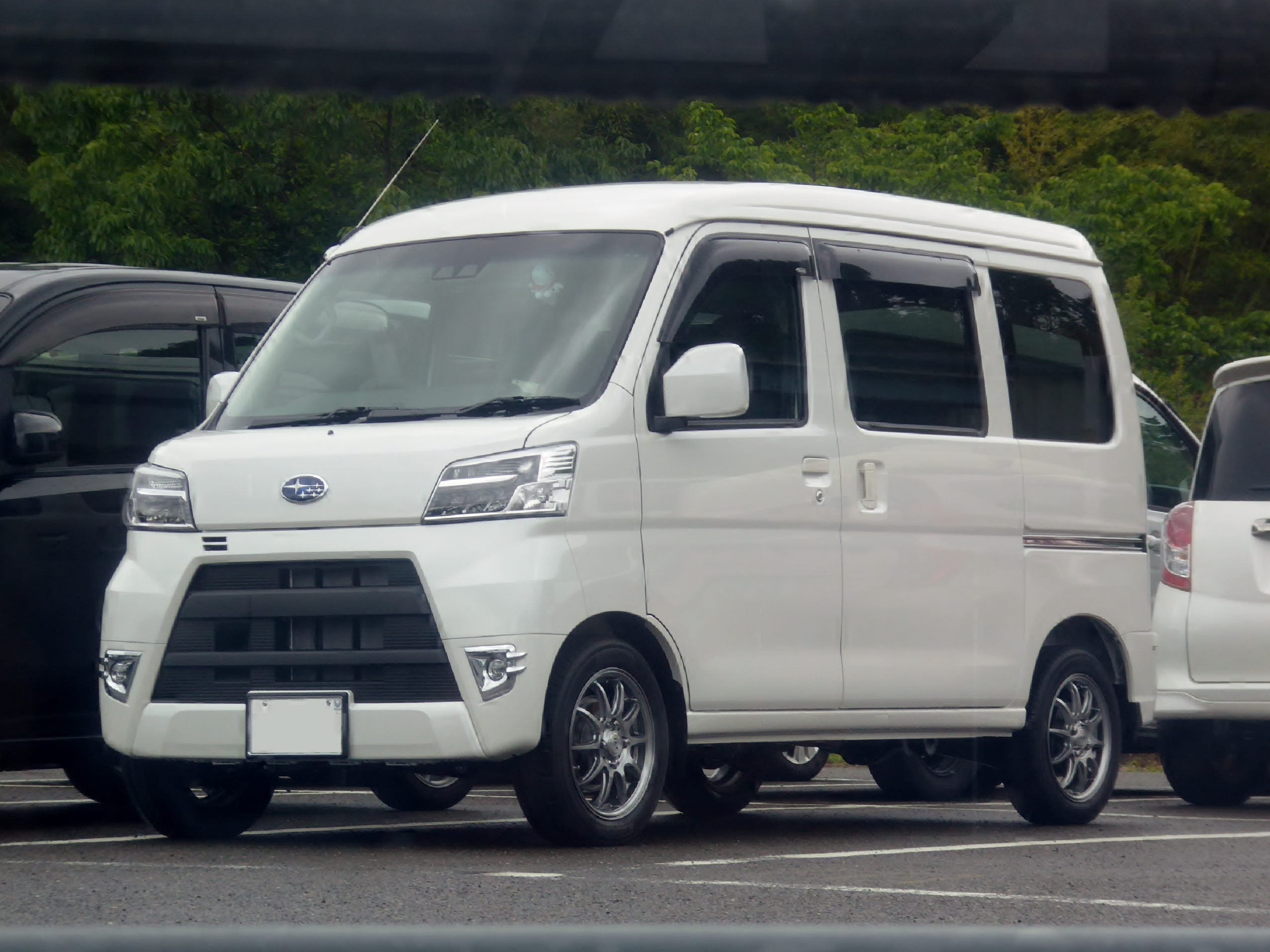 チューニングされたEBD-S321B型スバル・サンバーバンVCターボスマートアシストを撮影。